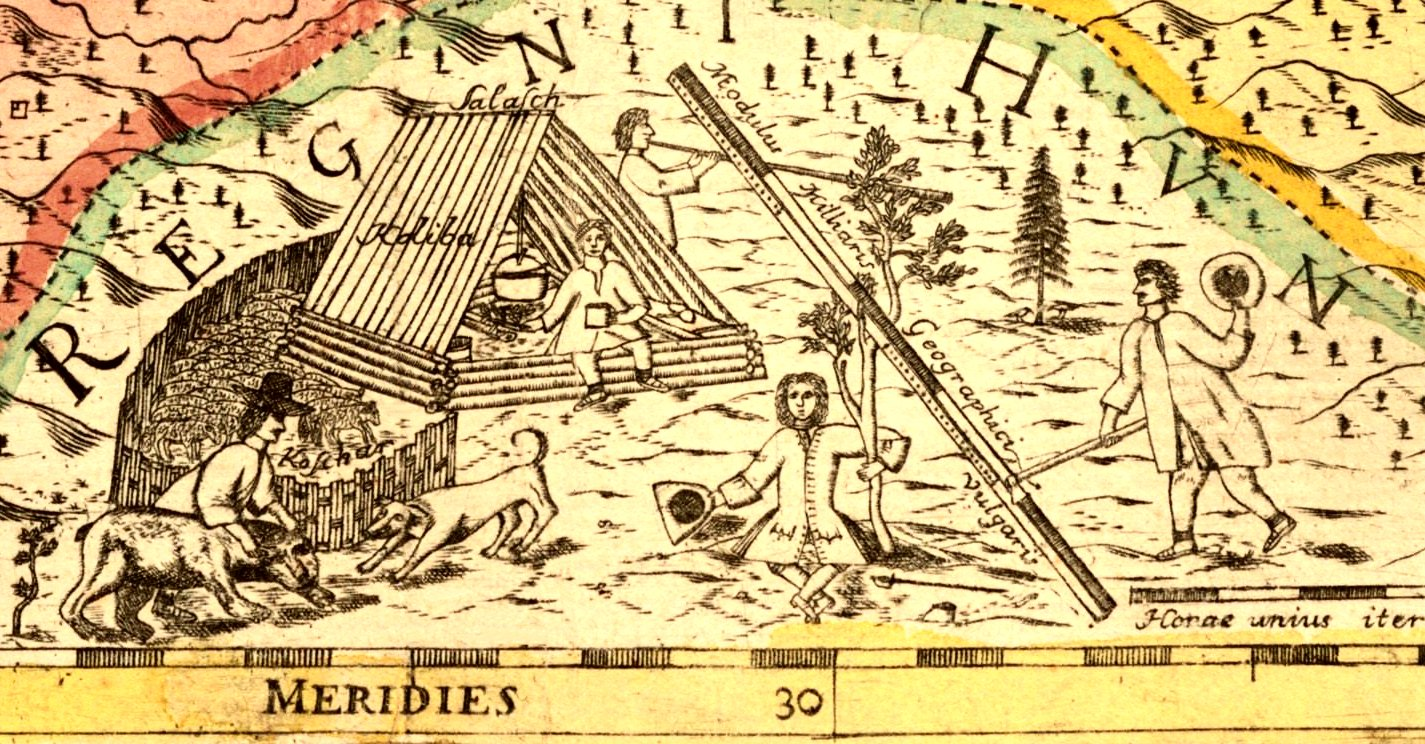 Koliba, szałas beskidzkich owczarzy